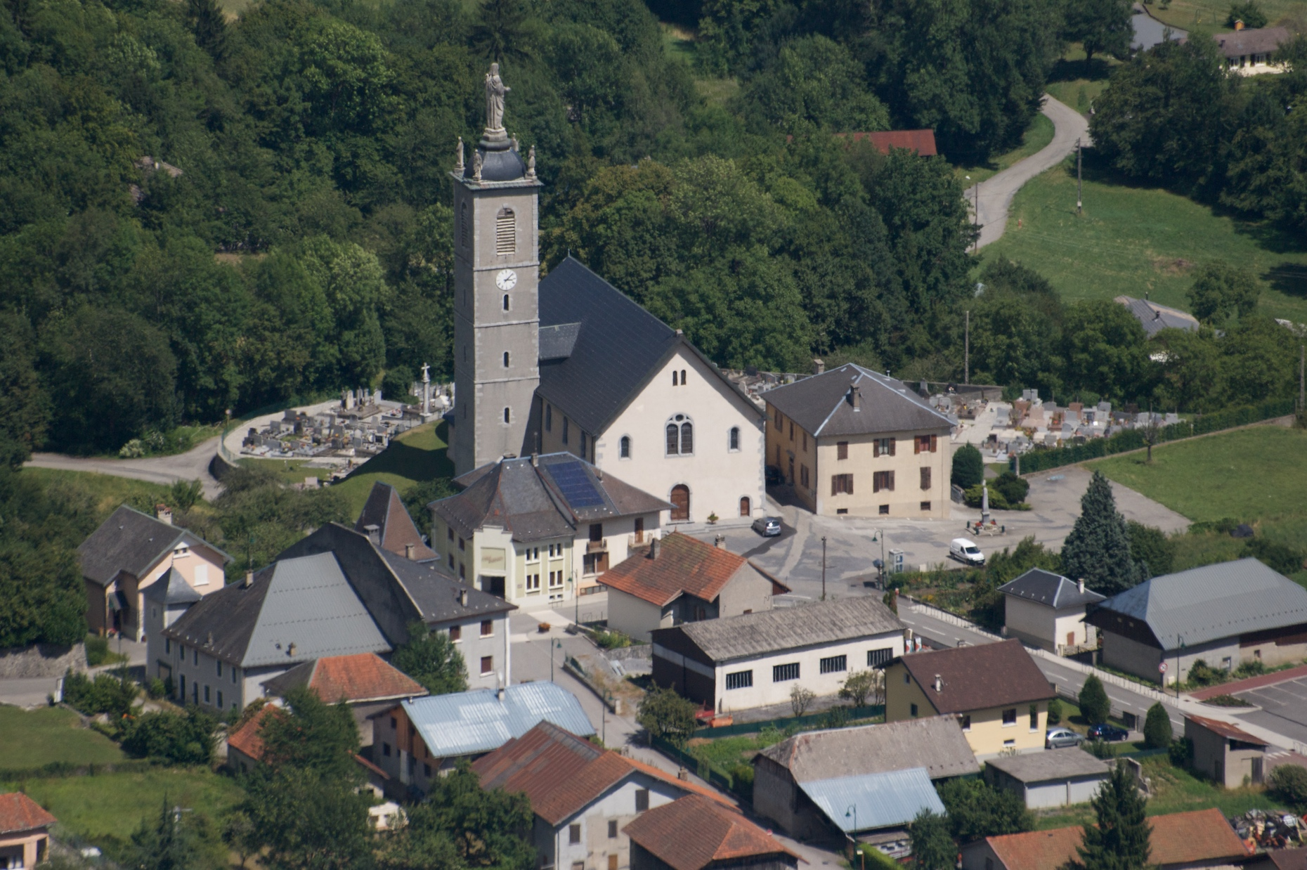 Chef-Lieu de Mercury vu du Fort de Tamié